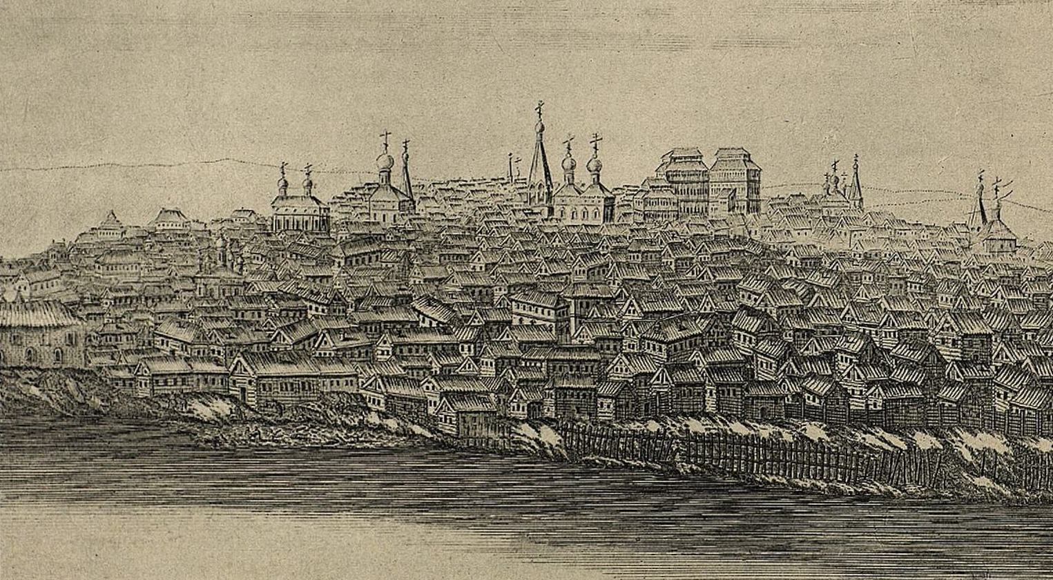 Вид из Замоскворечья от Старого Каменного моста до Красного холма